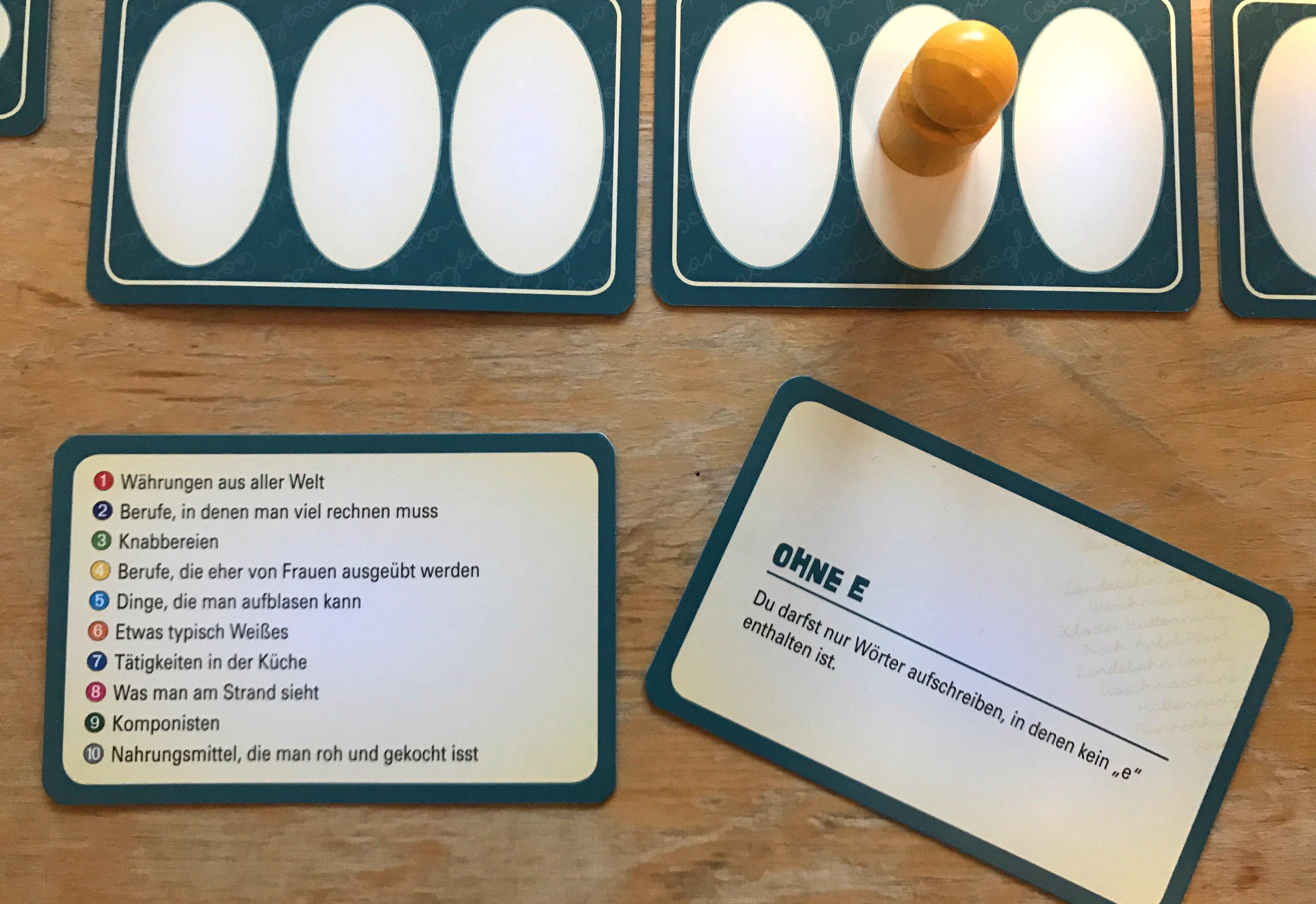 Spielmaterial für das Kartenspiel Haste Worte?